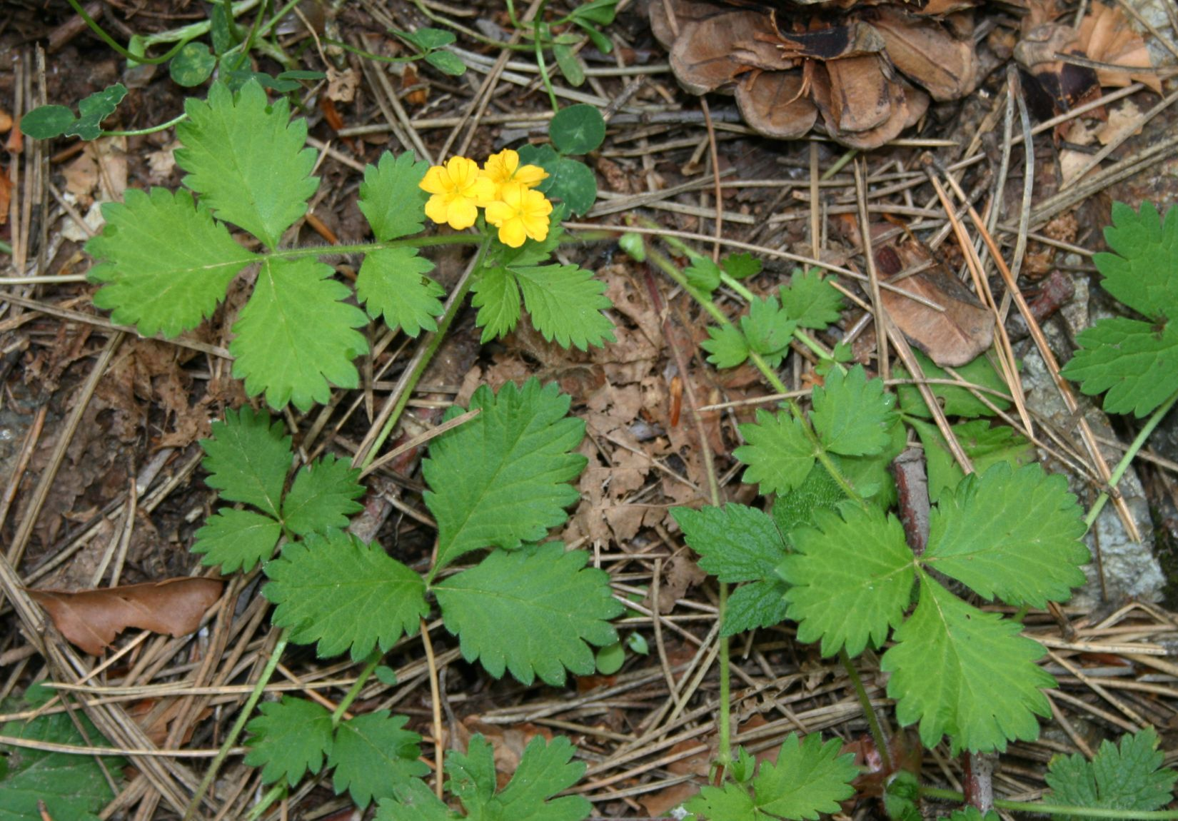 Aremonia agrimonoides, Rosengewächse (Rosaceae) - Italien/Italia/Italy: Kalabrien/Calabria, Prov. Reggio Calabria, Parco Nazionale dell'Aspromonte, Vallata dell'Amendolea SE Diga del Menta